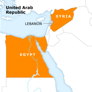 Mapa RAU